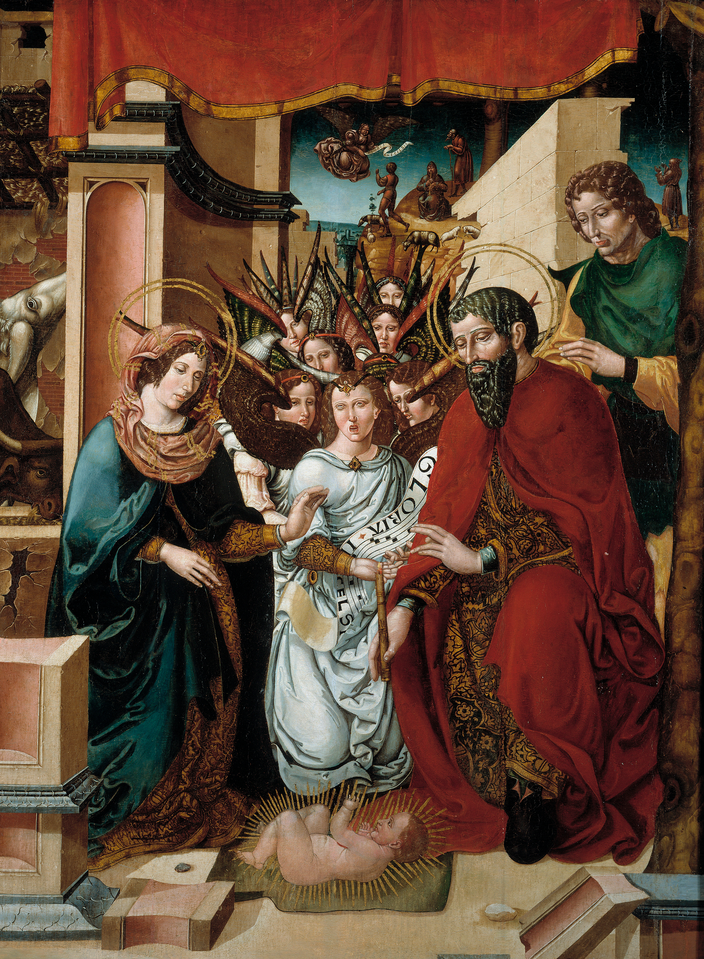 La obra representa el nacimiento o la natividad de Jesucristo, y formó parte del retablo mayor del Panteón Real del monasterio de Sigena, provincia de Huesca, (España).